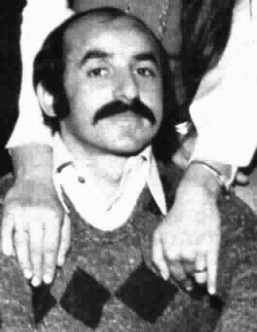 Italian stage company "Teatro Teatro" including Marisa Belli, Roberto Della Casa, Maurizio Micheli, Michele Mirabella, Nino Mangano, Gino Lavagetto, Alberto Terrani